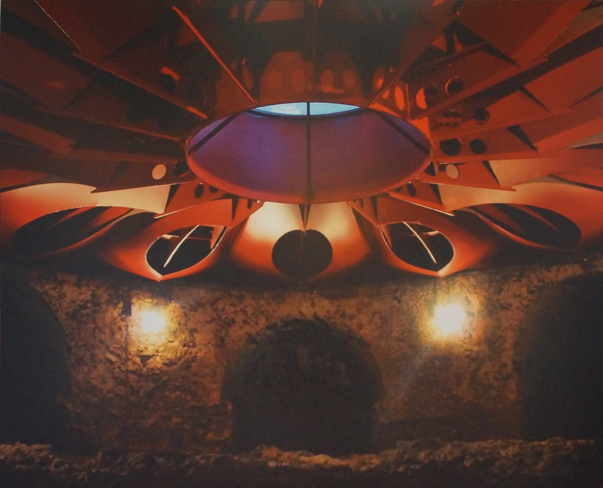 sala rossa + cappellaccio del banco lavico